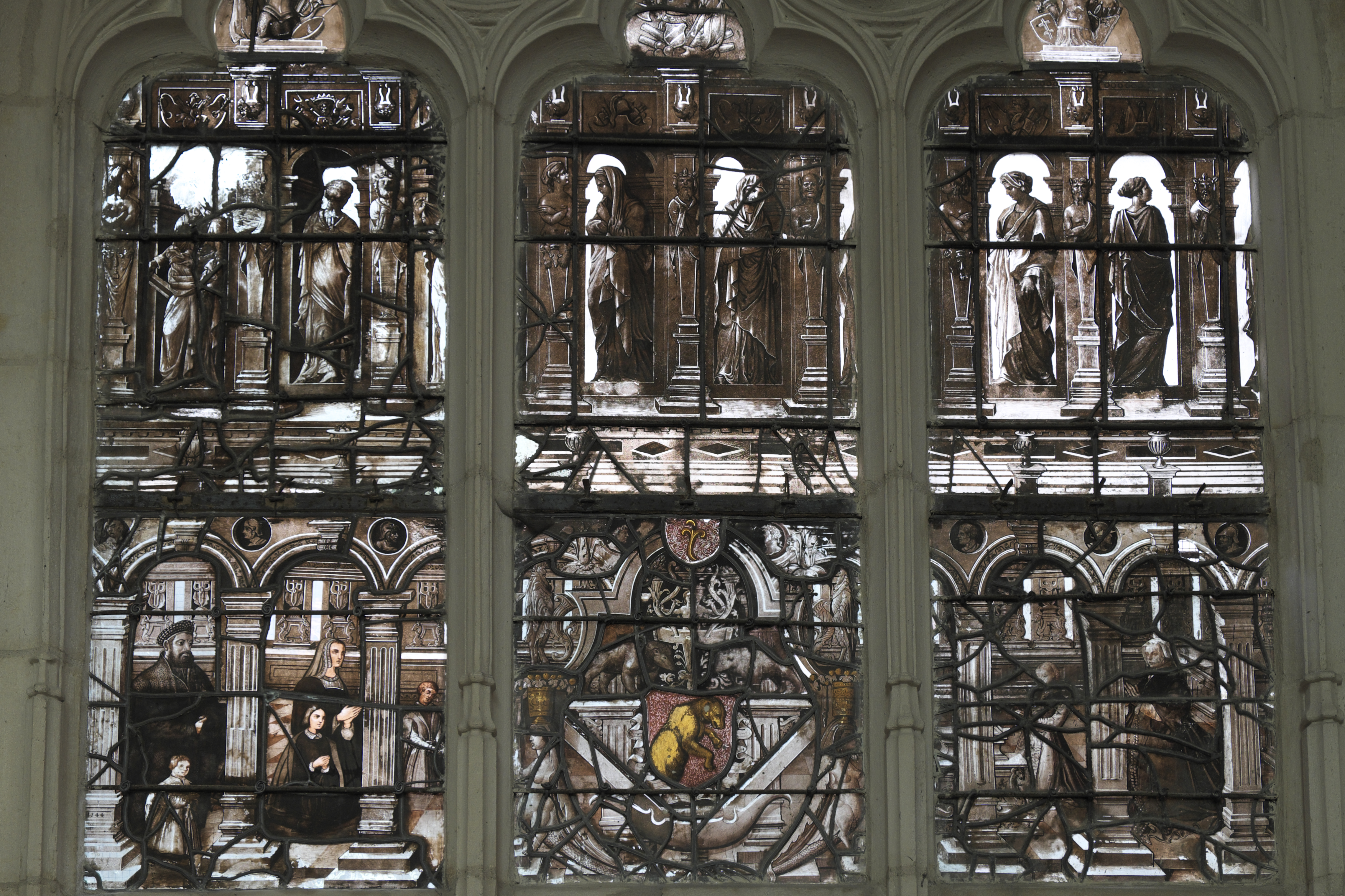 Bleiglasfenster (Baie 25) in der Basilika Saint-Nicolas in Saint-Nicolas-de-Port im Département Meurthe-et-Moselle (Lothringen/Frankreich), mit der Jahreszahl 1544, im Auftrag von Hanus Bermand für sein Hôtel particulier geschaffen, im 17. Jahrhundert in der Kirche eingebaut, mit Ergänzungen von 1848; Darstellung: Frauengestalten (oben), Stifter mit Kinder (unten links), Gemahlin Isabellion Sabvoye (unten rechts) und Bär, dem Wappen der Familie (unten Mitte)